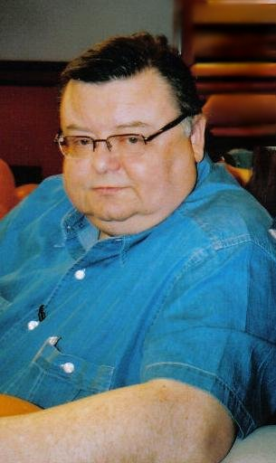 Wojciech Mann - polski prezenter telewizyjny